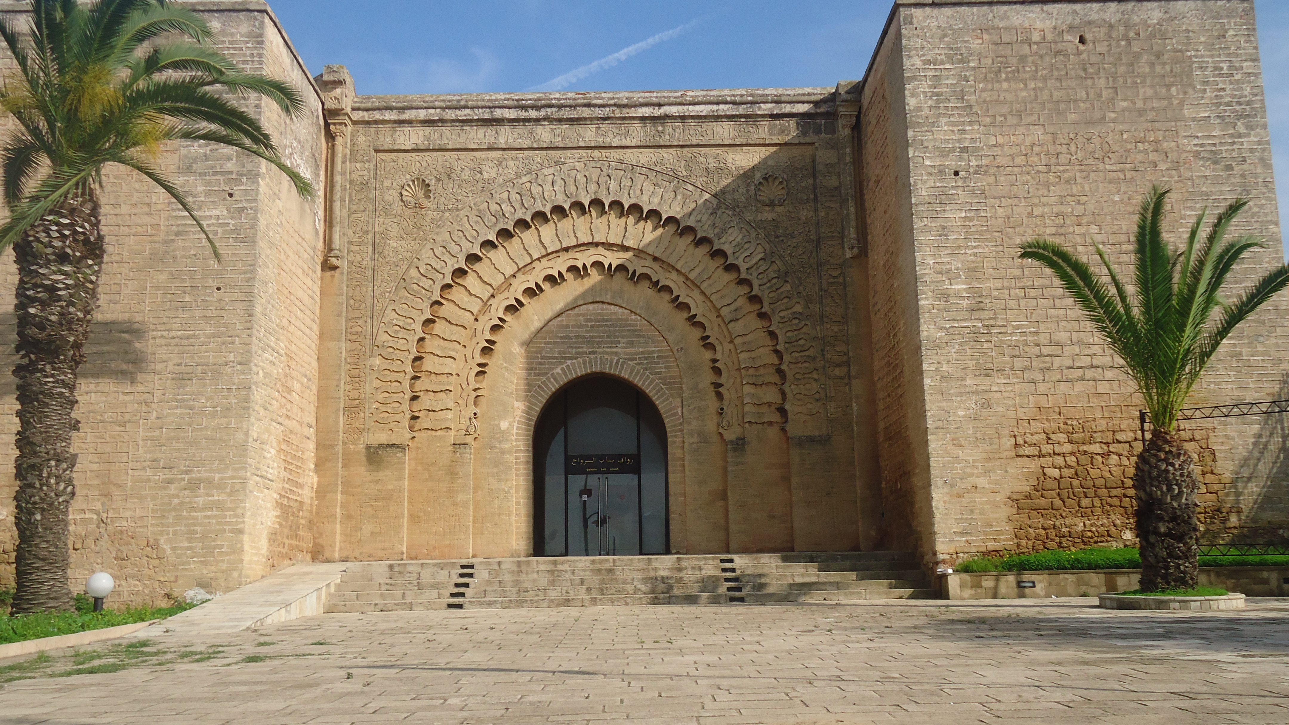 رواق باب الرواح بالعاصمة الرباط، يعد من أبرز أبواب الرباط التاريخية